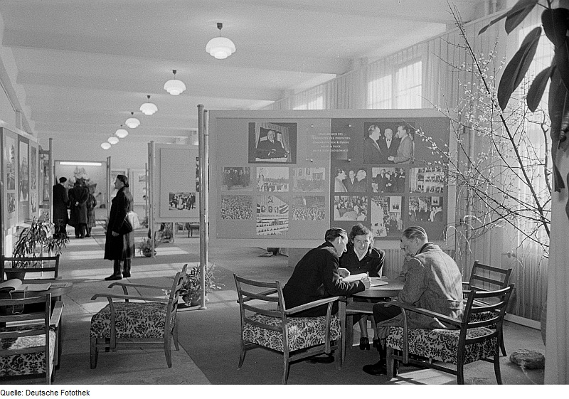 Original image description from the Deutsche Fotothek Besucher vor Ausstellungstafeln